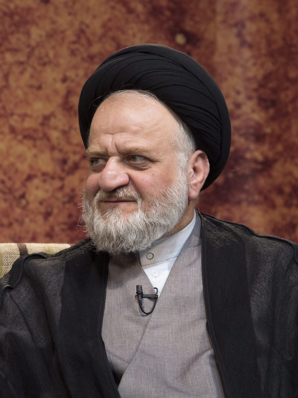 سید علی شهرستانی